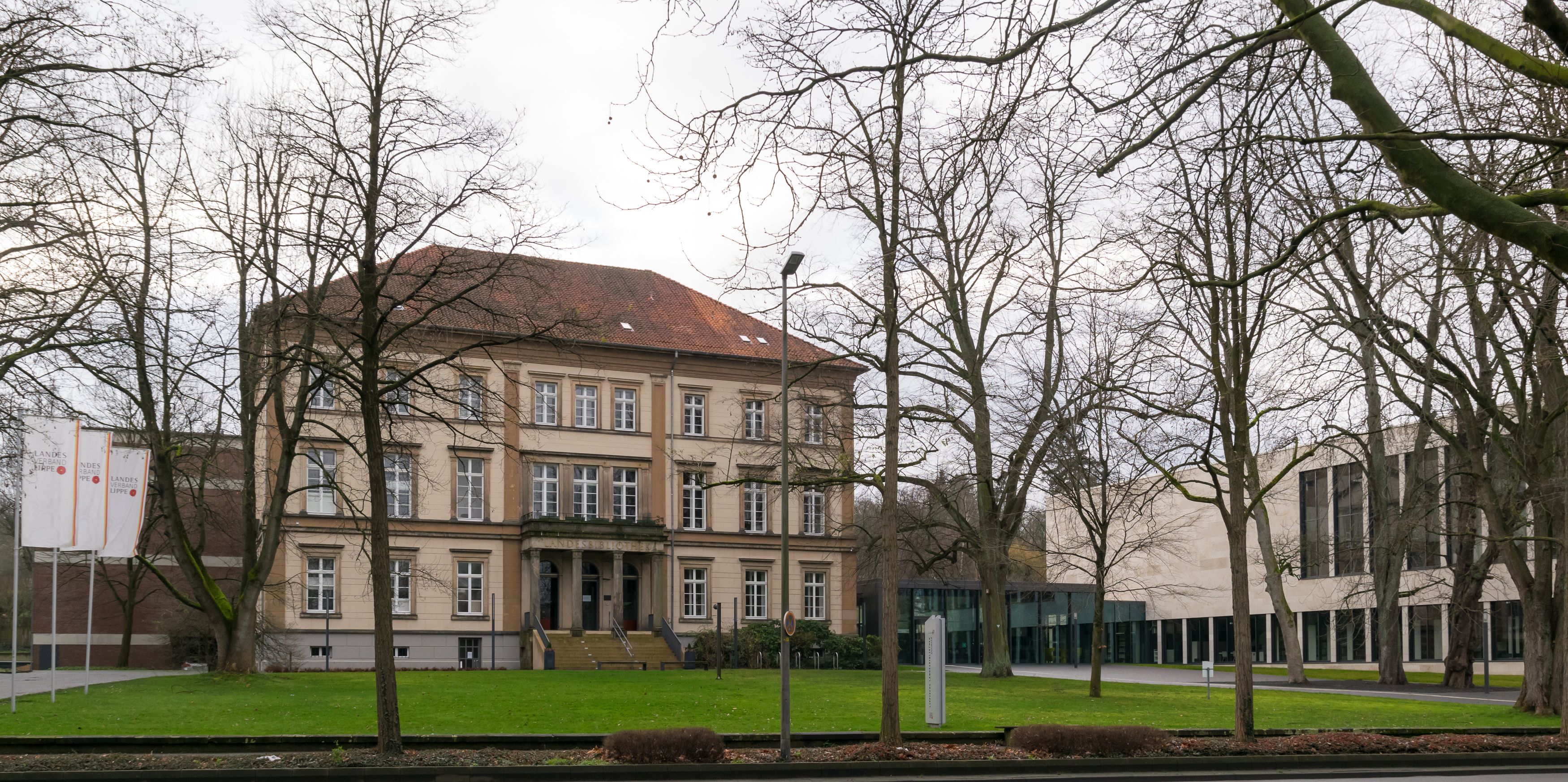 Lippische Landesbibliothek in Detmold im Januar 2016.